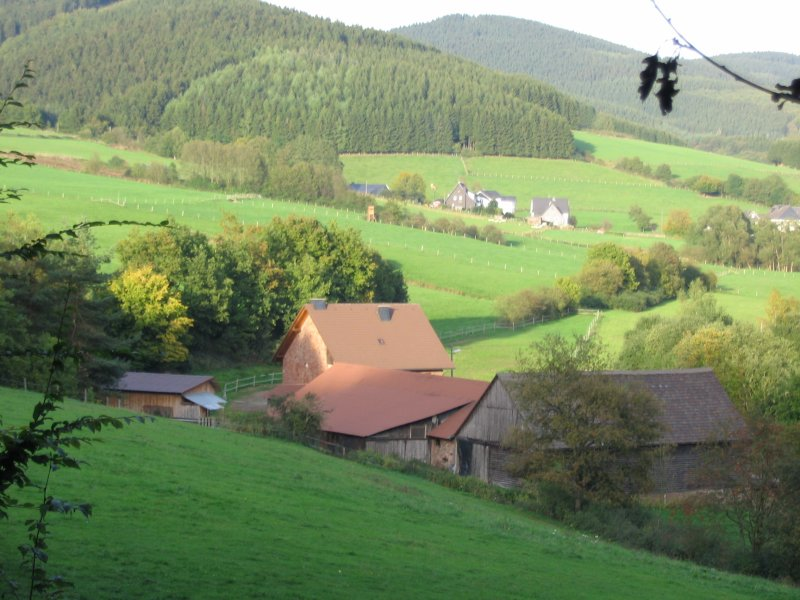 Haus Bruch in der Gemeinde Kirchhundem, NRW, Deutschland